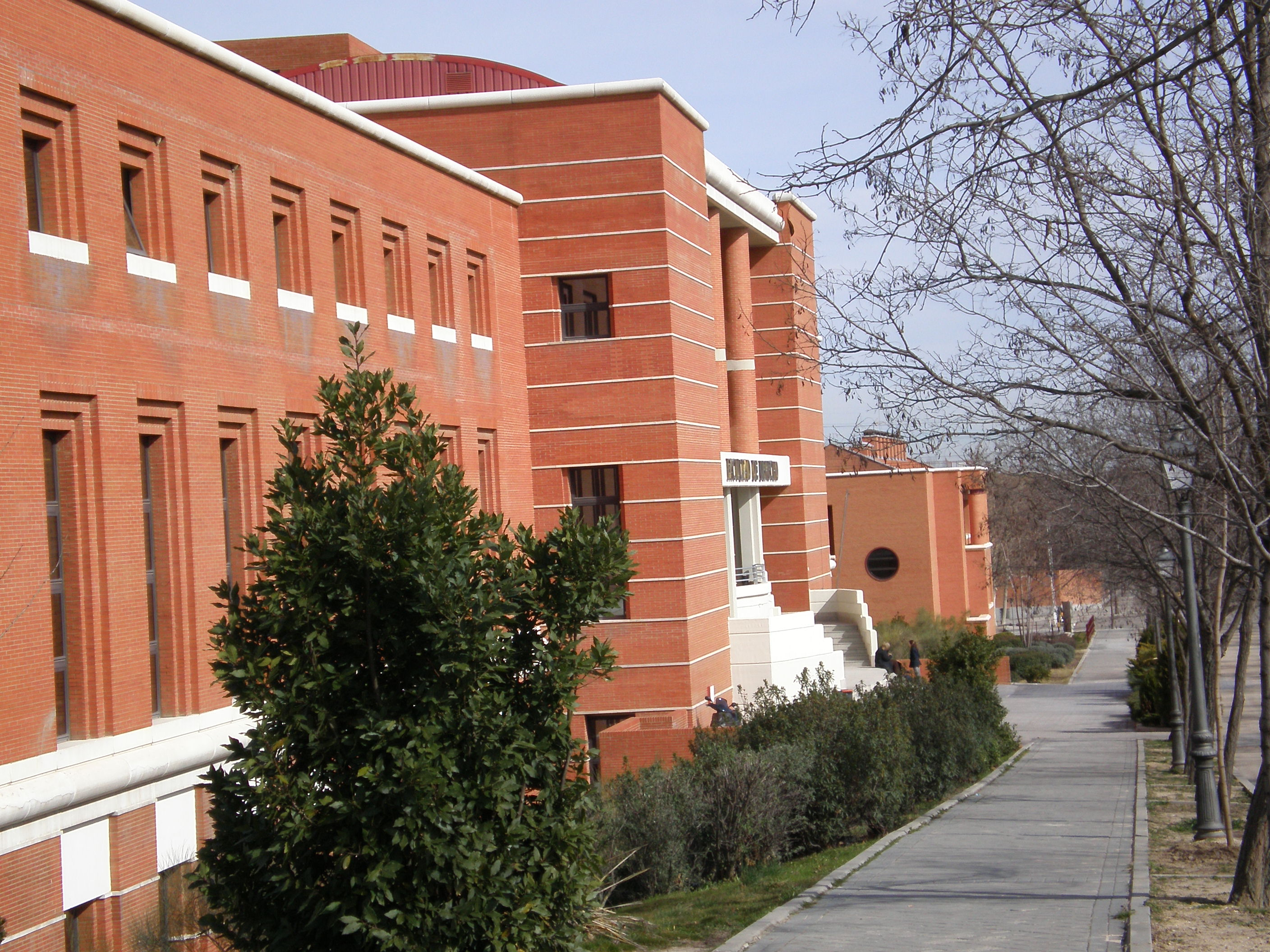 Entrada principal de la Facultad de derecho de la UAM UAM Faculty of Law main entrance